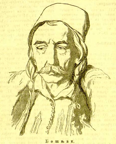 Das Bild des einen Bosniak aus: Велики илустровани календар (Der große dargestellte Kalender), 1879, Seite 49-50